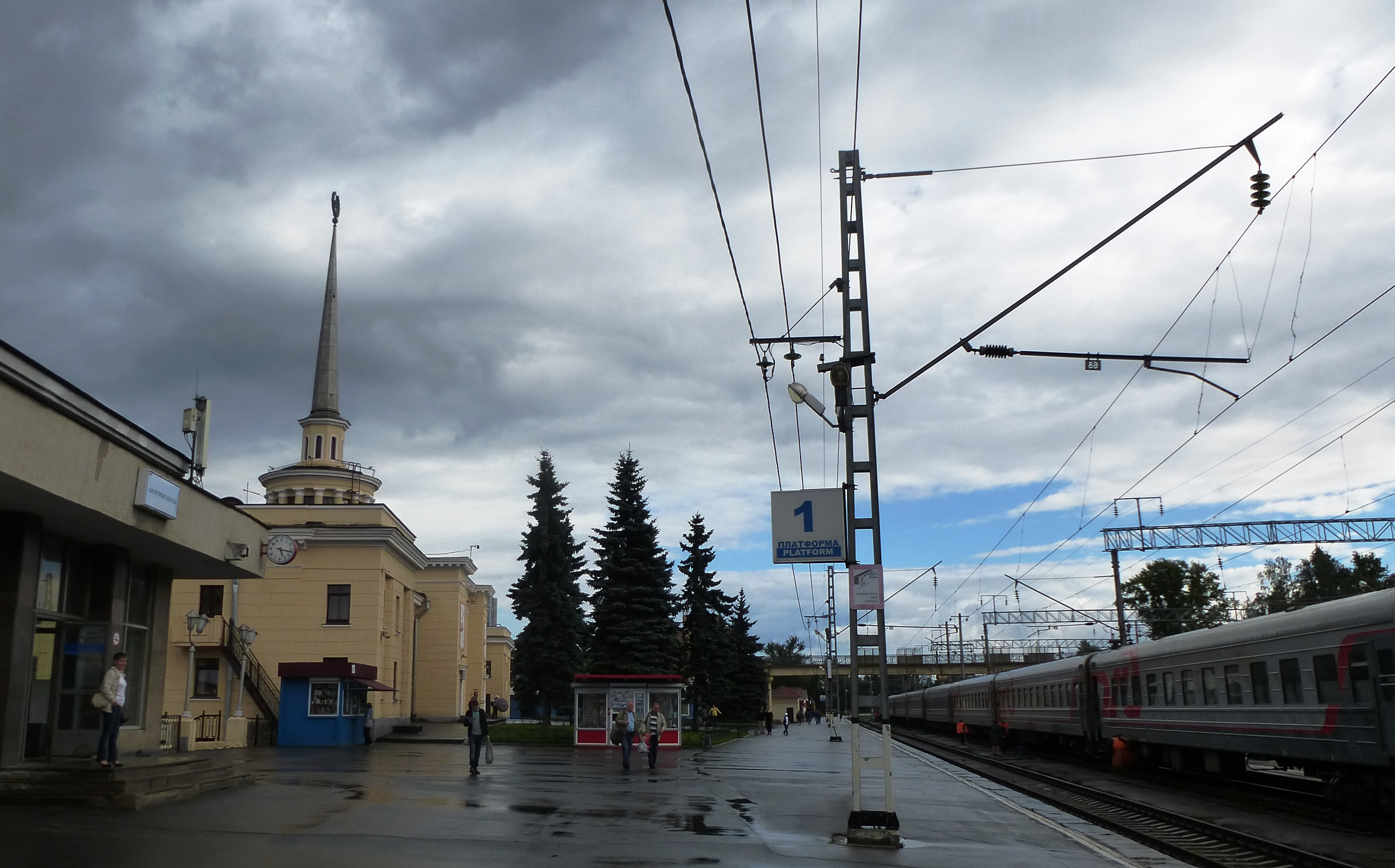 Перрон вокзала станции Петрозаводск